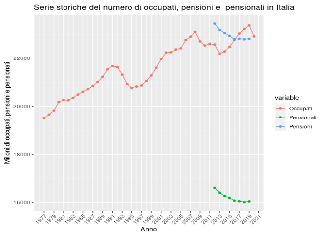 file realizzato con RStudio con dati Istat